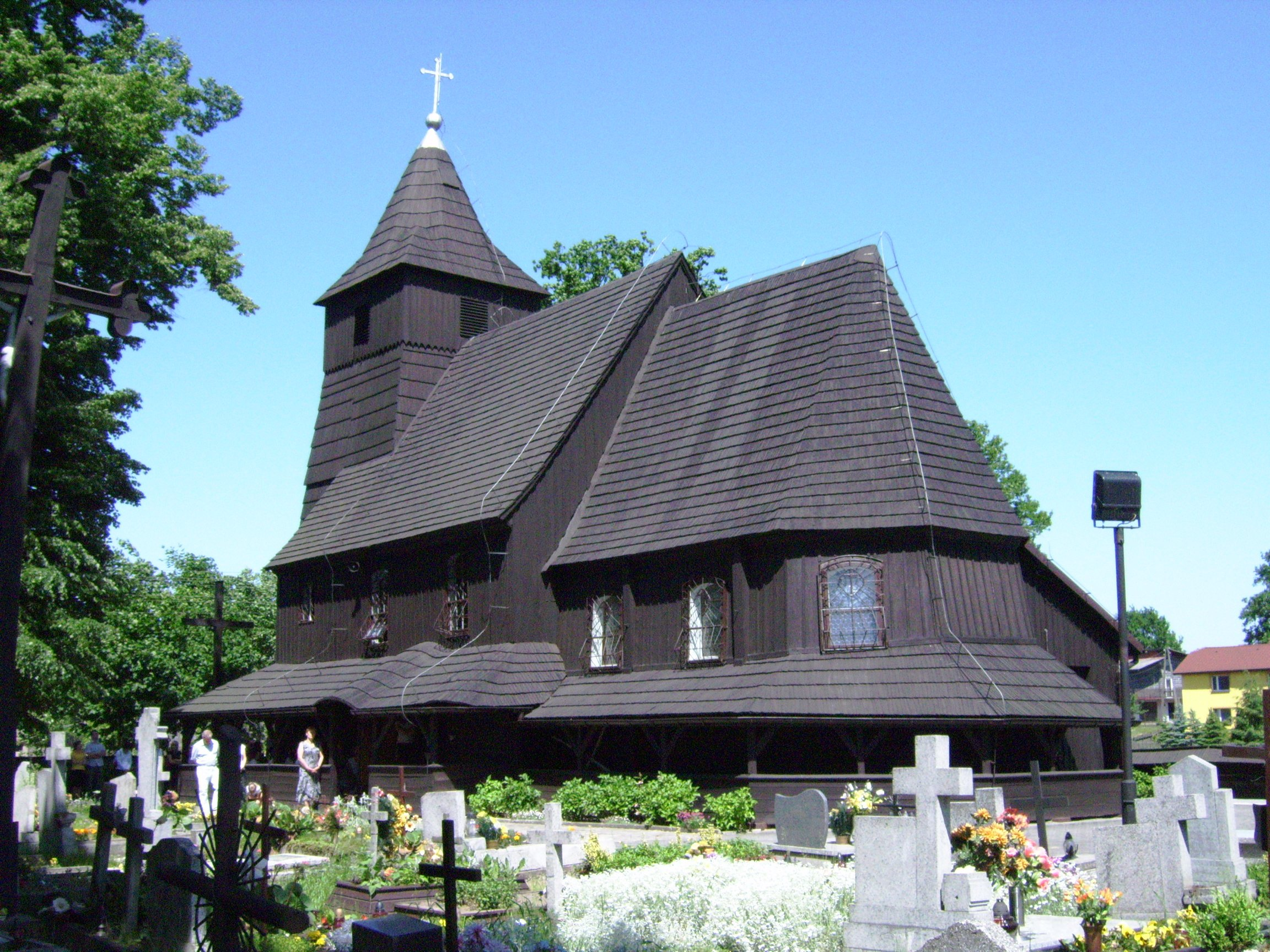 Kościół.